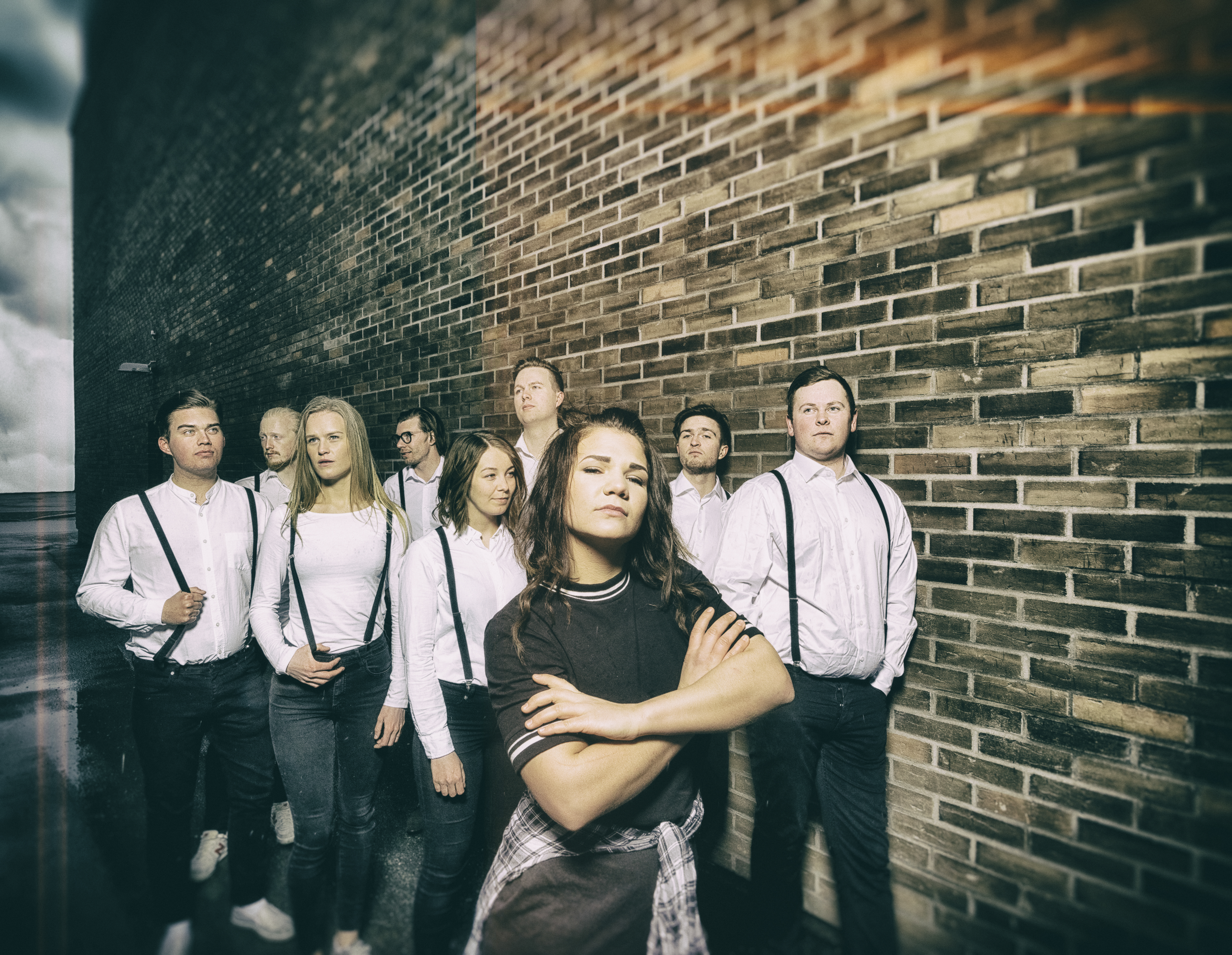 Foto: Eir-Jørgen Bue